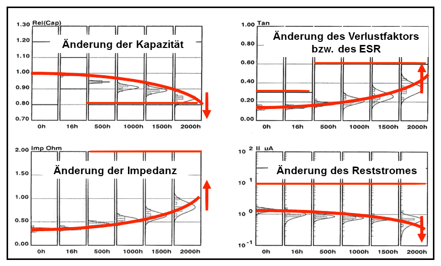 Änderungen elektrischer Parameter während einer Lebensdauerprüfung über 2000 h bei 105 °C